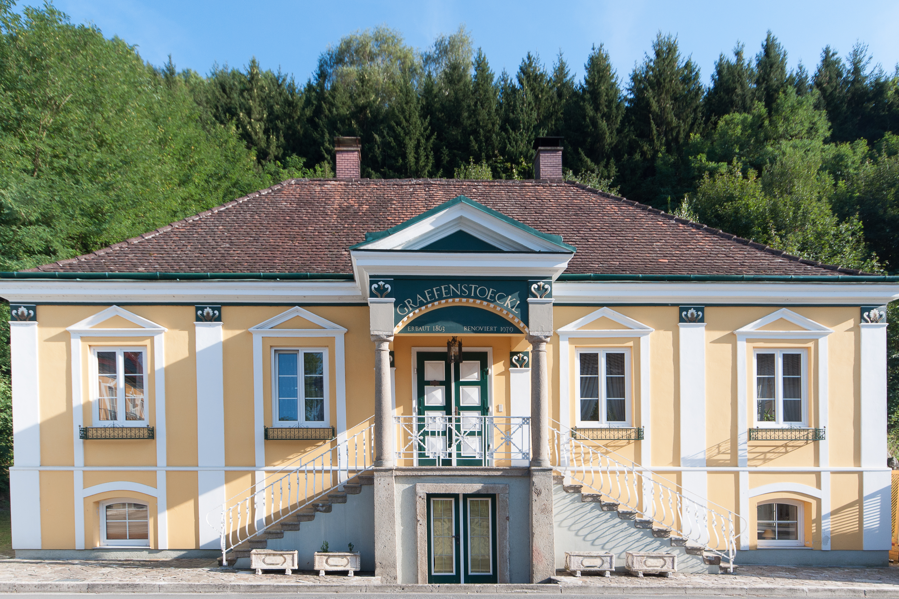 Wohnhaus, Gräfenstöckl